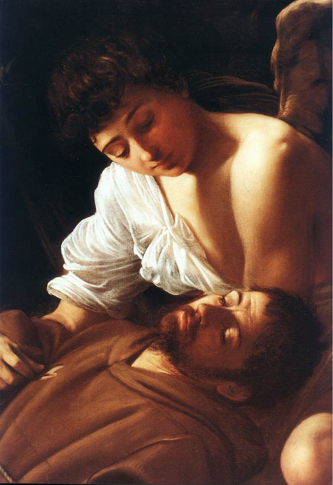 detail